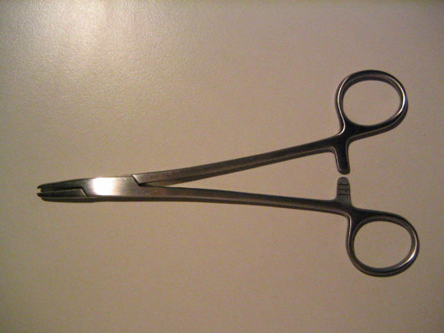 Das Bild zeigt einen Nadelhalter nach Heger.